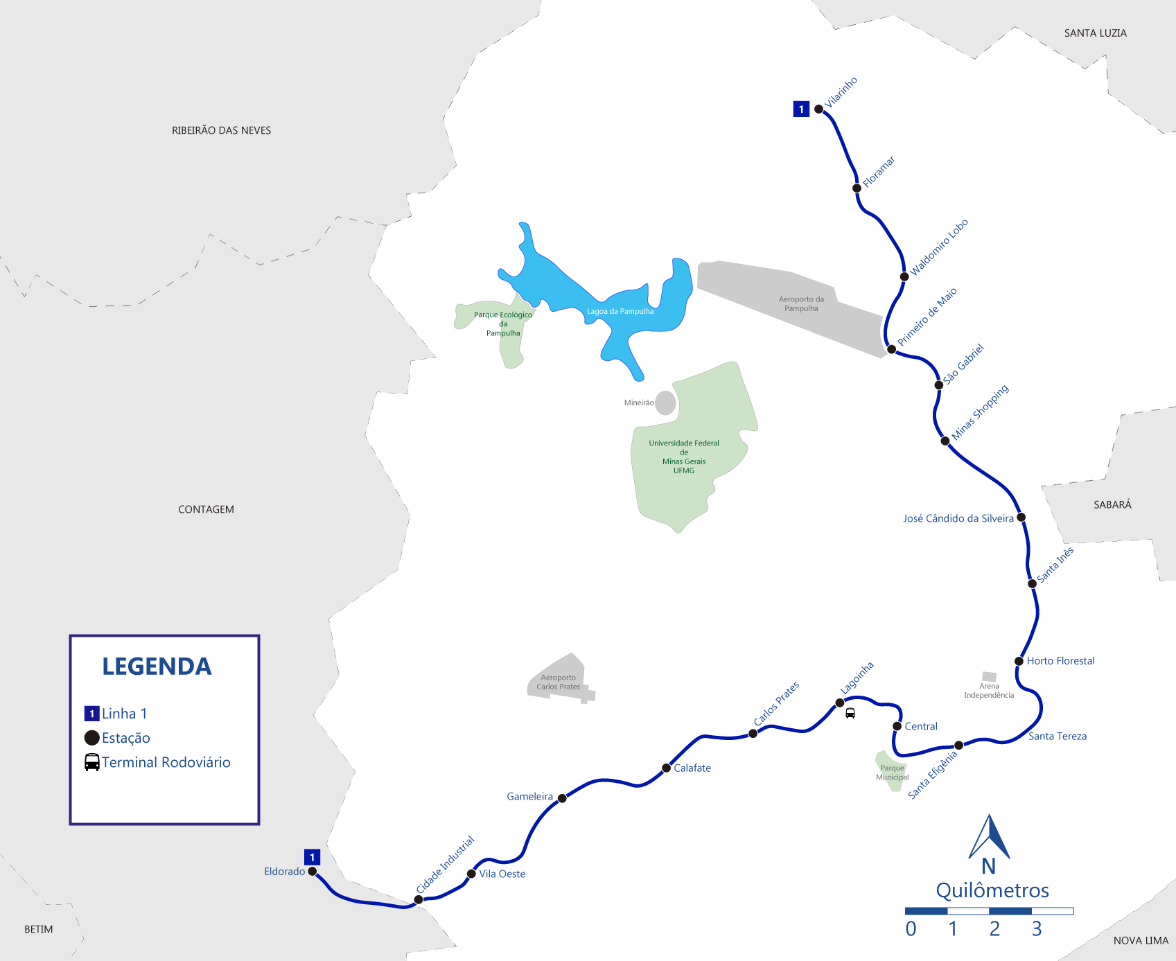 Mapa do Sistema Metroviário de Belo Horizonte, Minas Gerais, em maio de 2018.